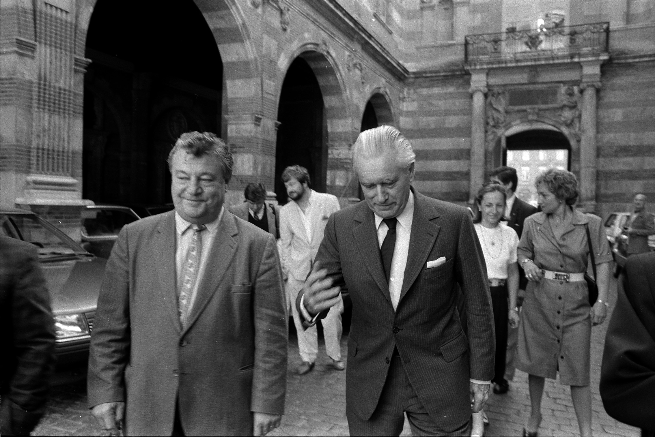 La cour du Capitole. Le 28 Mai 1985. Vue de A. Brouat et de Jacques Chaban-Delmas dans la cour du Capitole, après la victoire du Stade Toulousain en finale contre le RC Toulon.